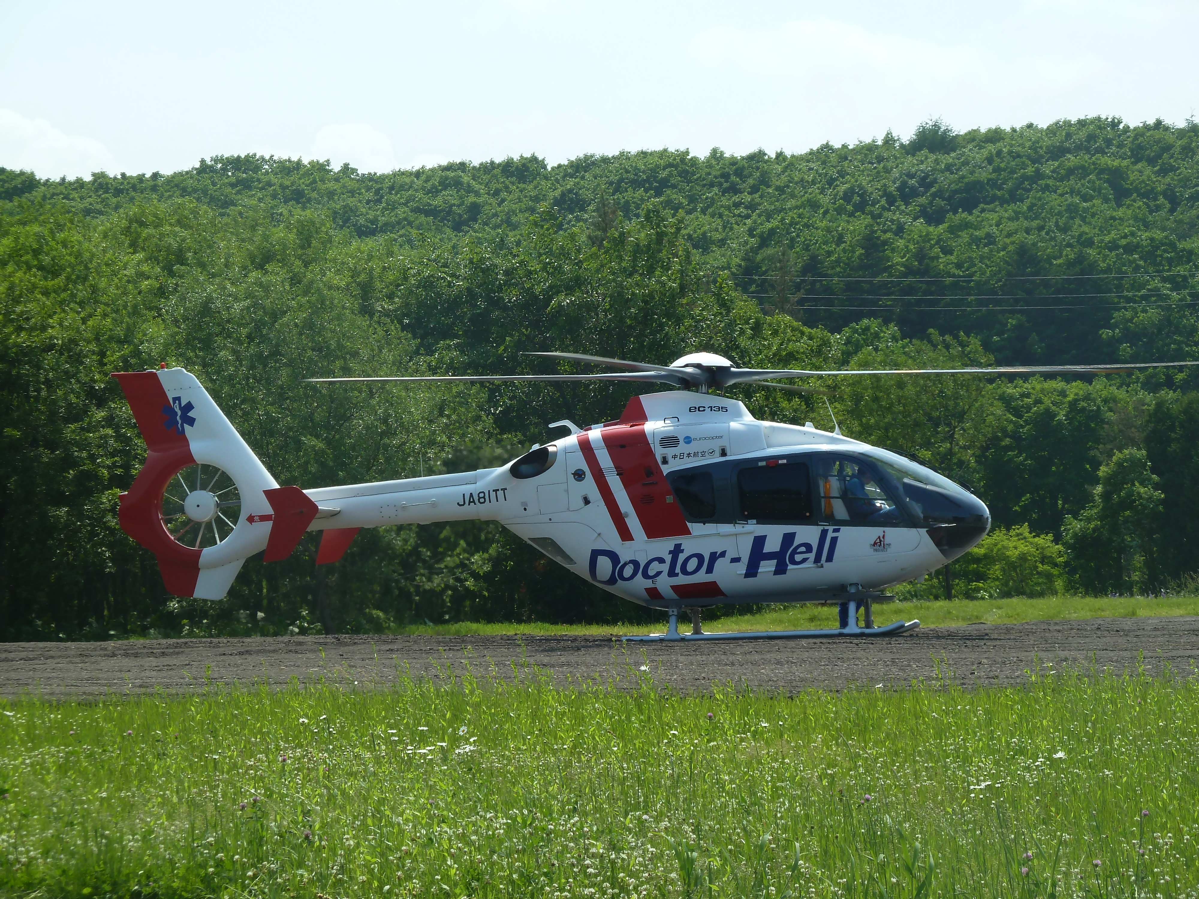 中日本航空のユーロコプターEC135 P1（JA81TT） 市立釧路総合病院と釧路孝仁会記念病院により運航されるドクターヘリ 日本国北海道弟子屈町の摩周厚生病院付近で撮影